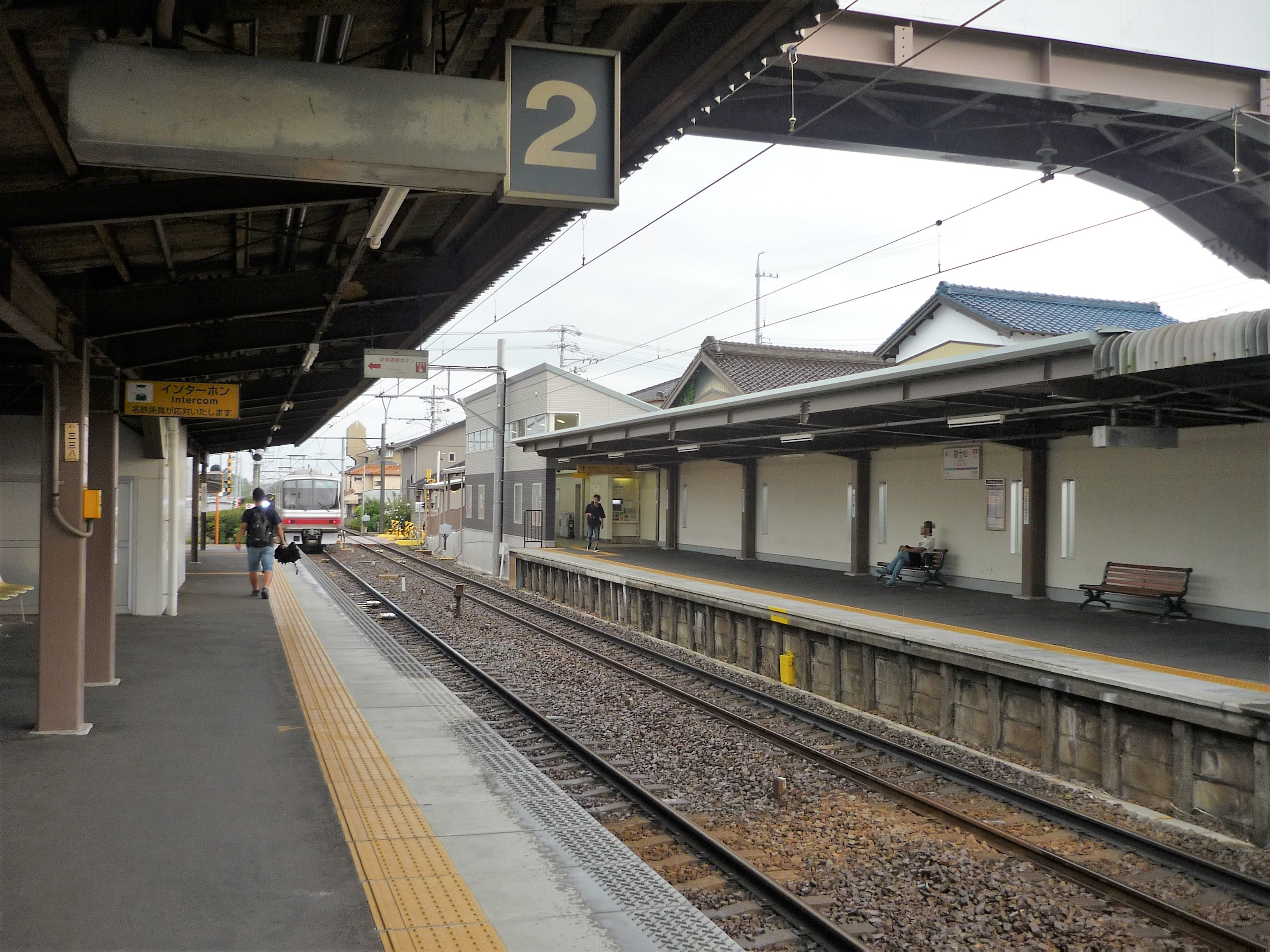 富士松駅プラットホーム Panasonic Lumix DMC-FS3